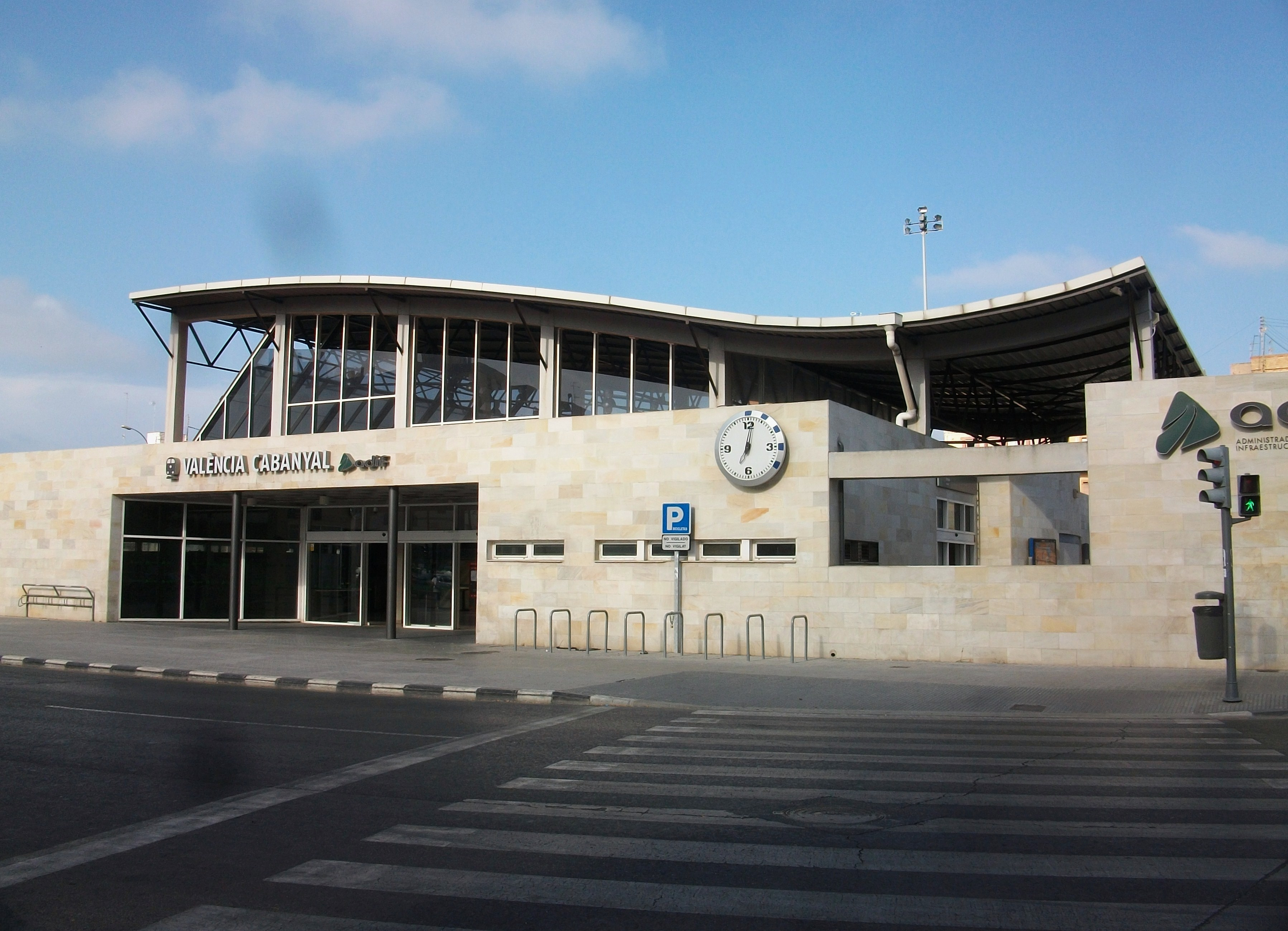 Estació del Cabanyal, exterior.